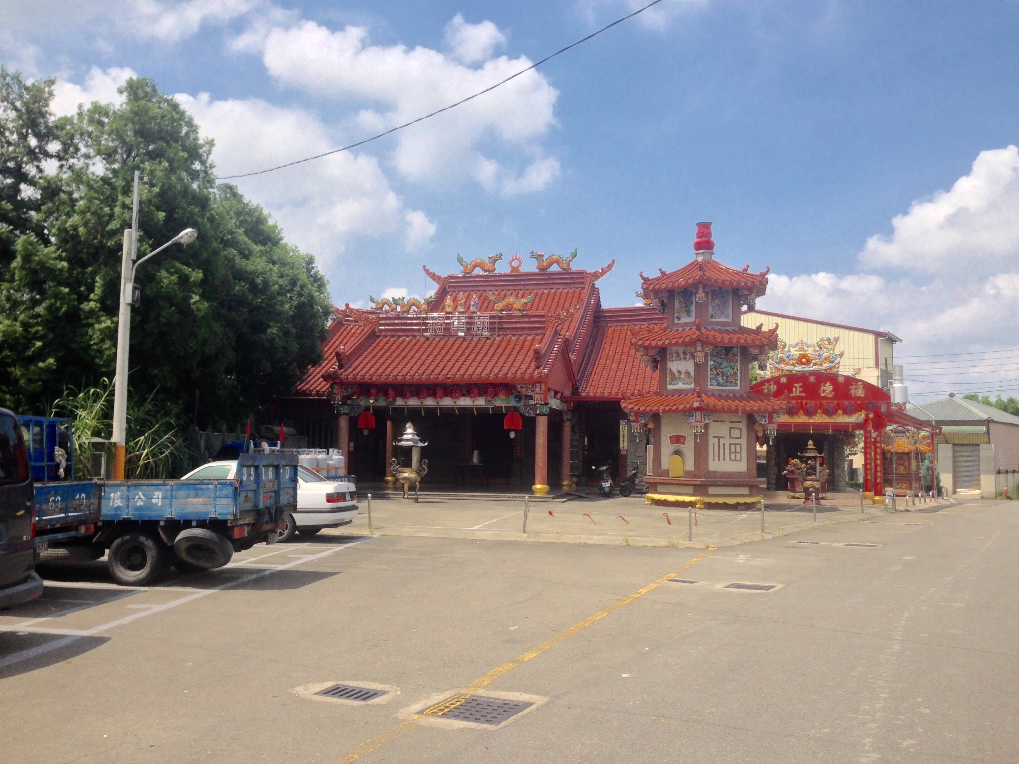 中文（台灣）: 潭子將軍廟遠景